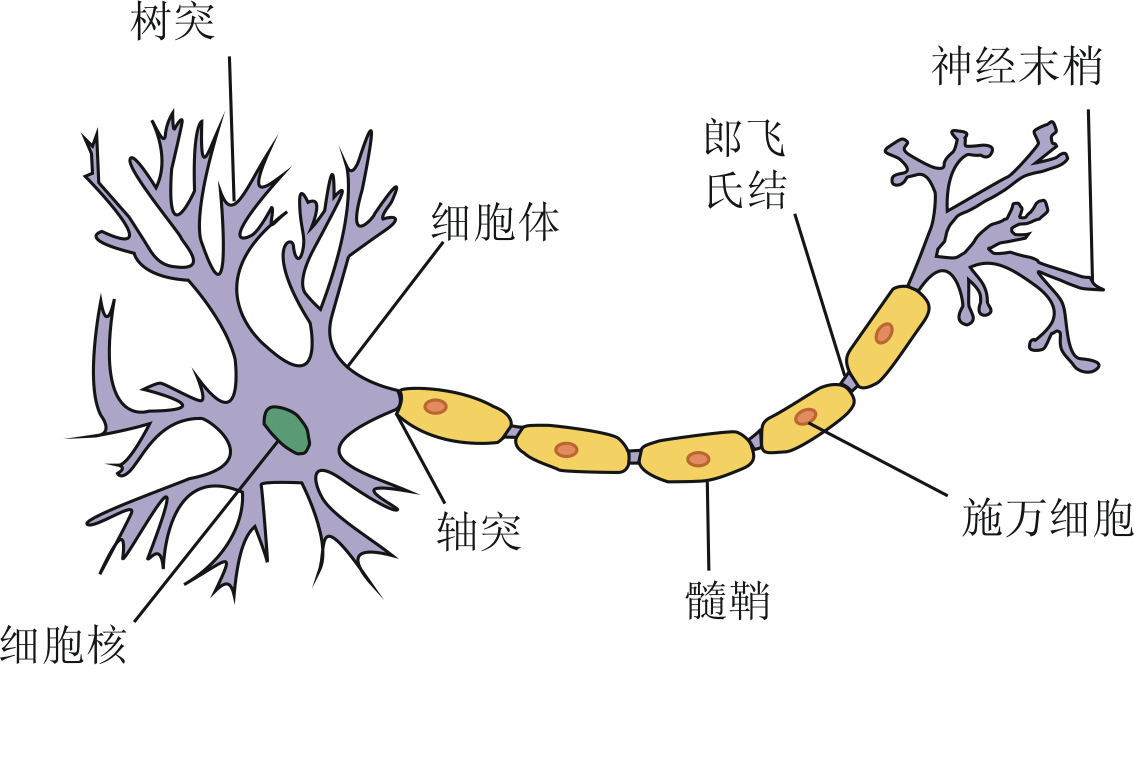 神经元（神经细胞）图示